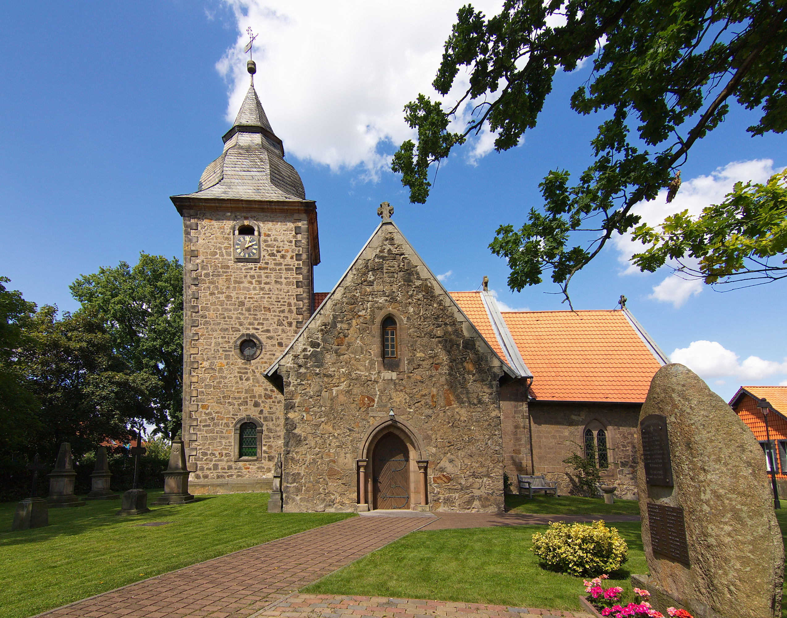 Dorfkirche in Klein Flöthe (Flöthe), Niedersachsen, Deutschland